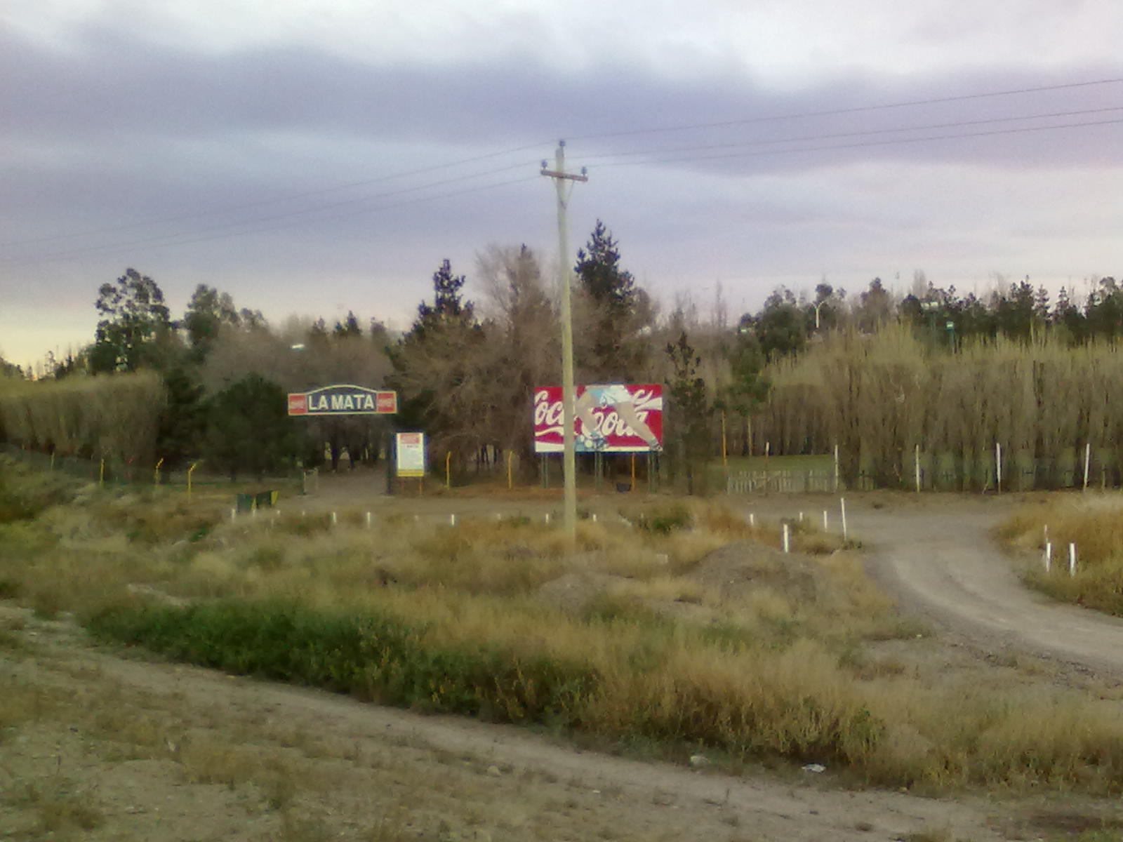 LAS CANCHAS DE ENTRENAMIENTO DE LA CAI EN EL PREDIO LA MATA